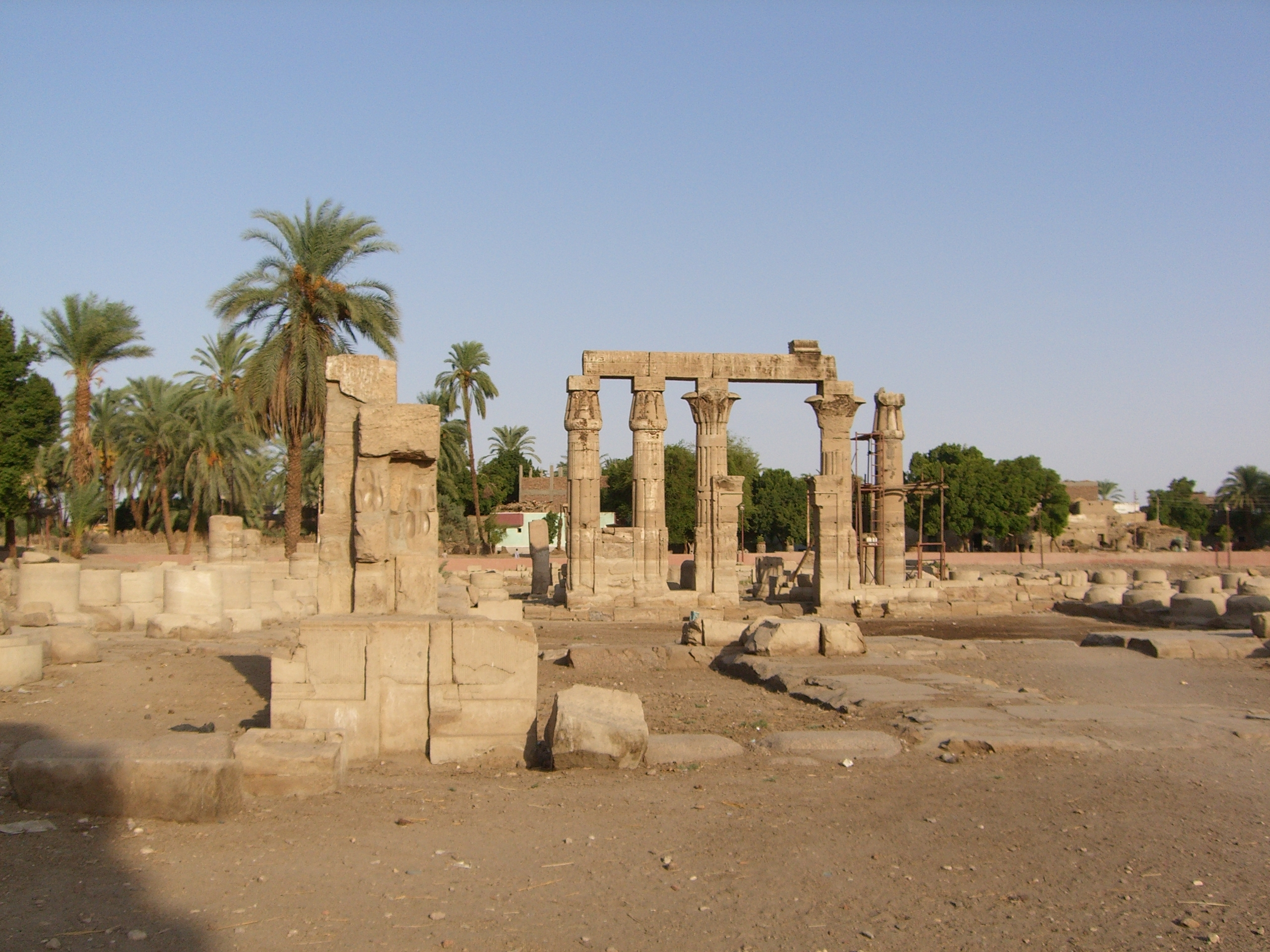 Vue des ruines du temple de Montou à Médamoud - Périodes ptolémaïques et romaines.